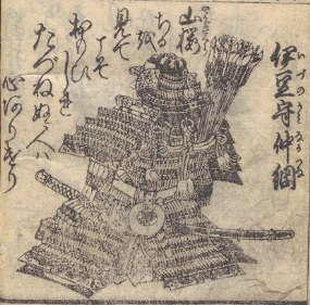 源仲綱